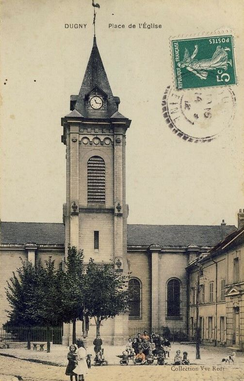 Dugny.Place de l'église